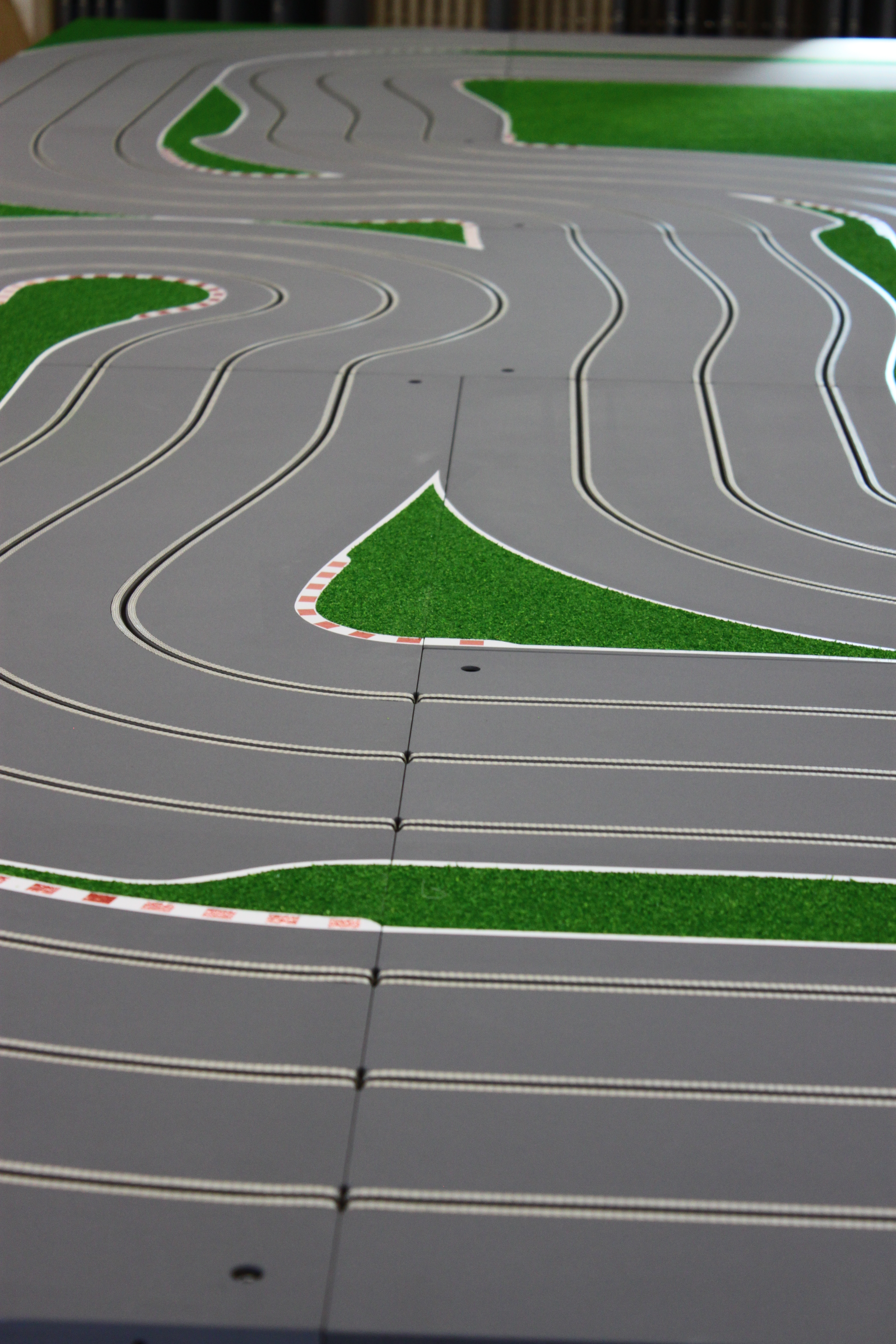 Slotfire Holzrennbahn mit Curbs und begrünten Infields